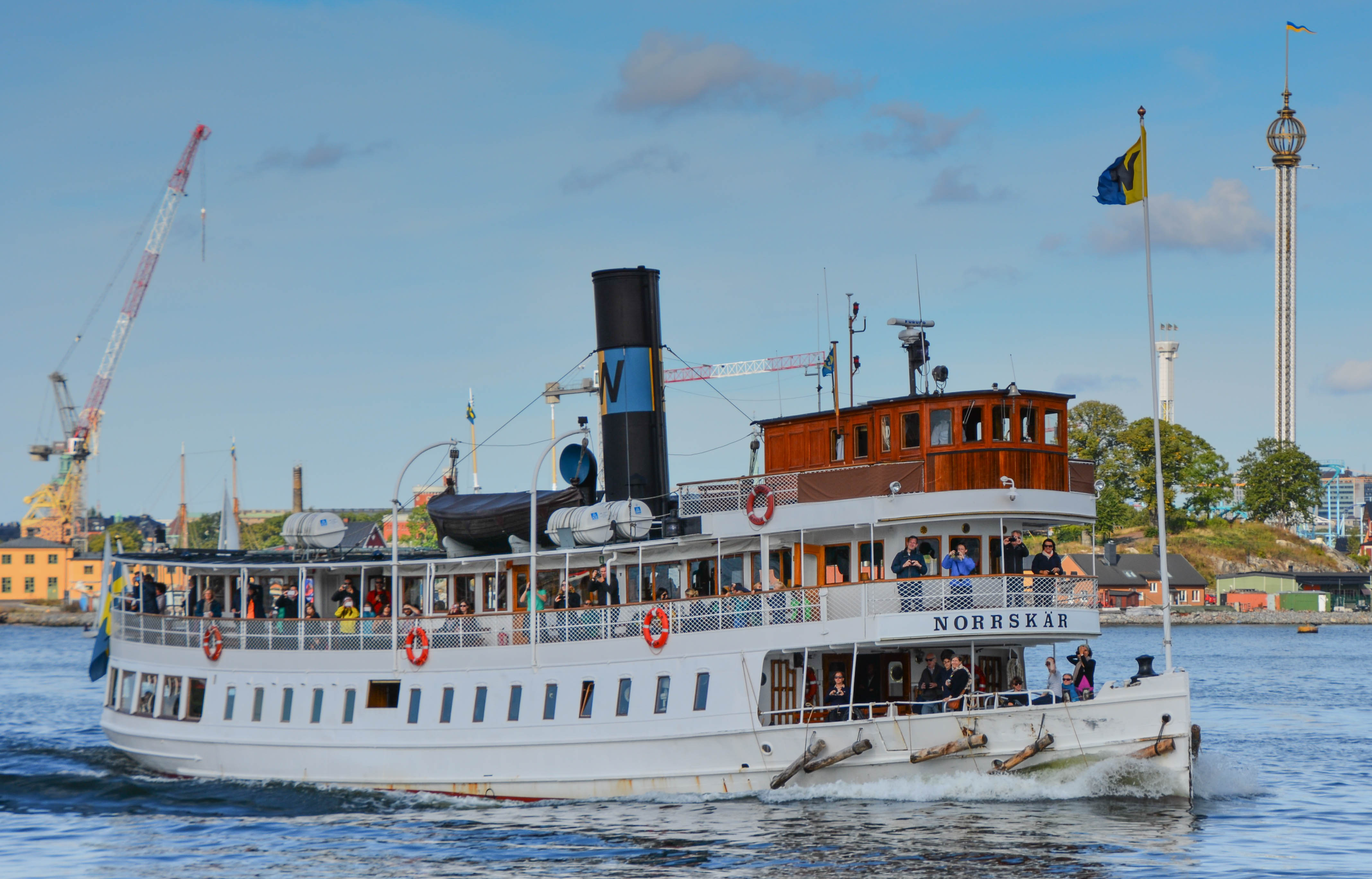 S/S Norrskär outside Gröna Lund in Stockholm. This is an image of a protected Swedish ship, with call sign SGFD .